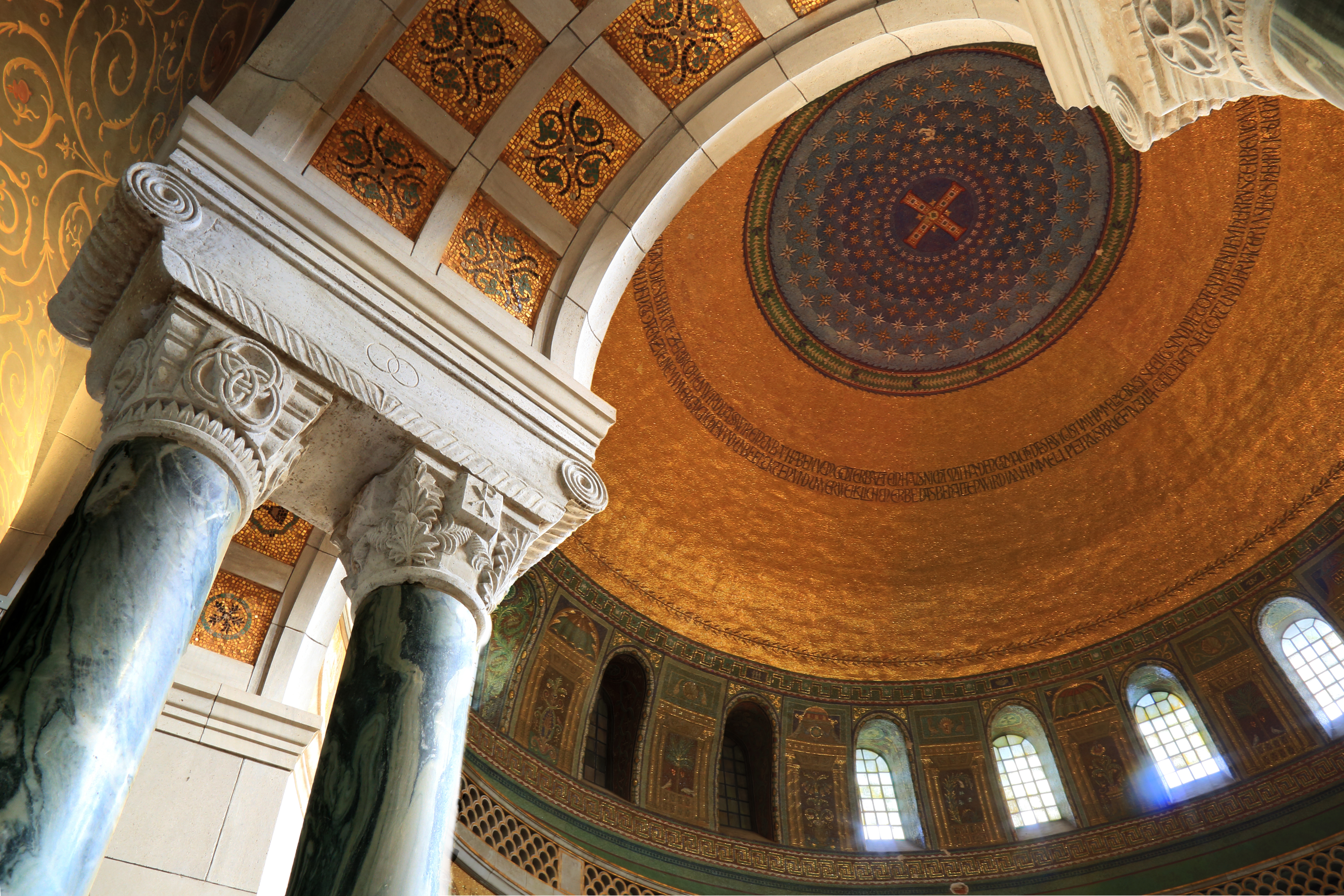 Innenansicht der Kuppelhalle des Mausoleums Bückeburg